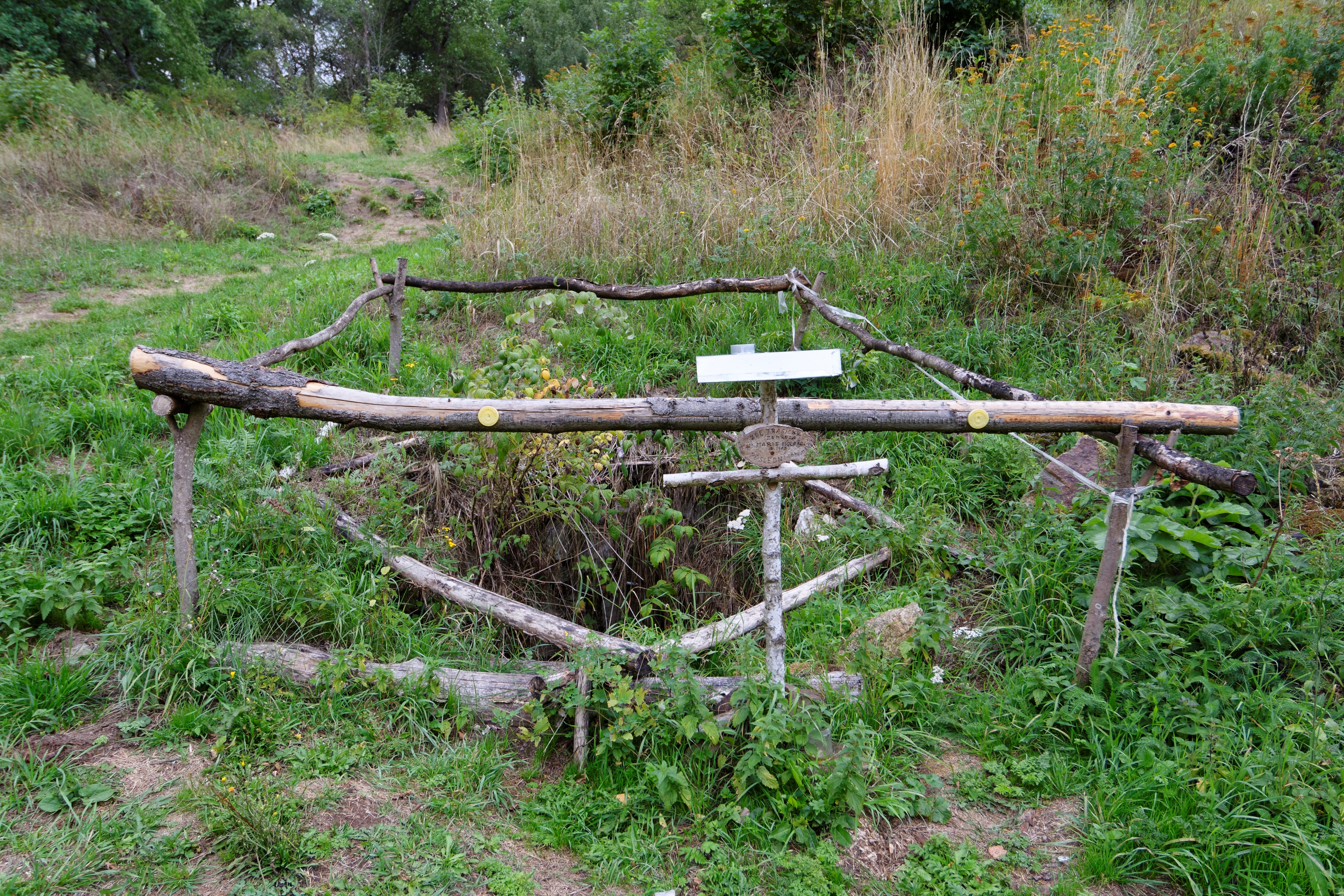 Skoky, studna s pomníčkem Marie Holešové, poslední obyvatelky obce.